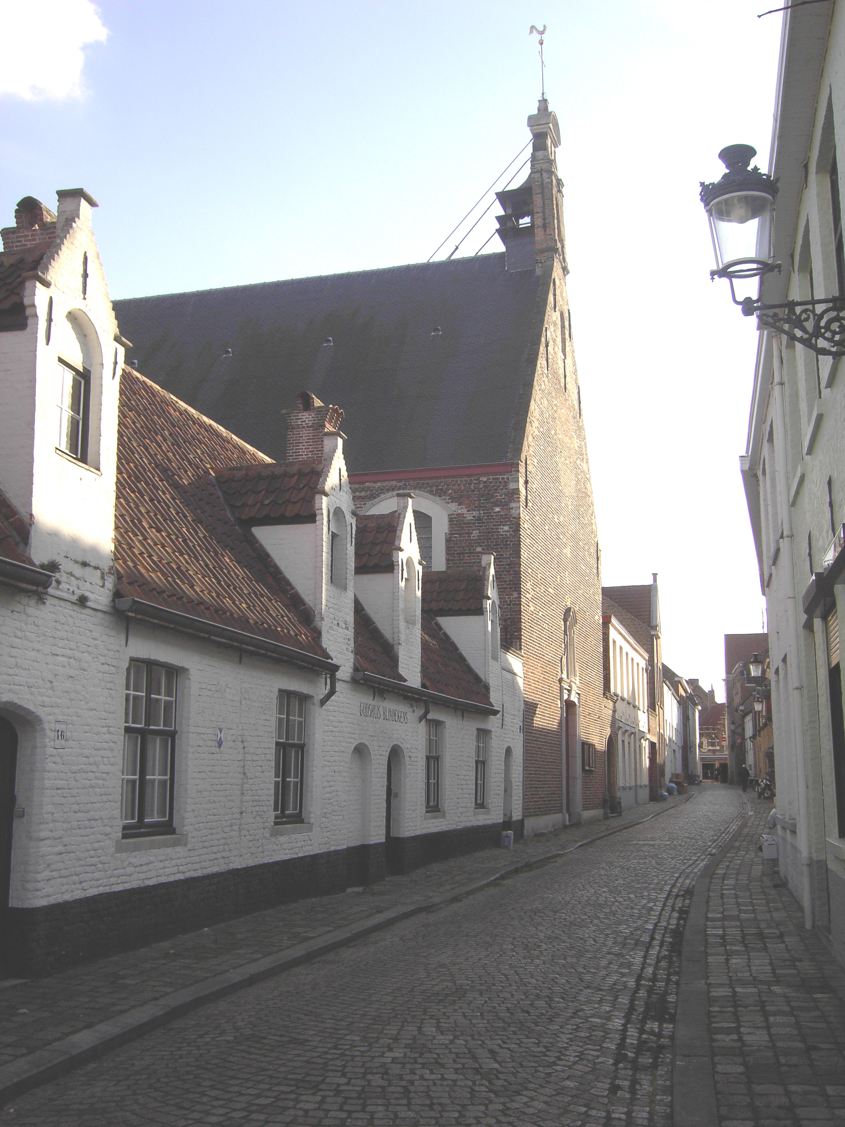 De Onze Lieve Vrouw Blindekenskapel - Kreupelstraat - Brugge - West-Vlaanderen - België